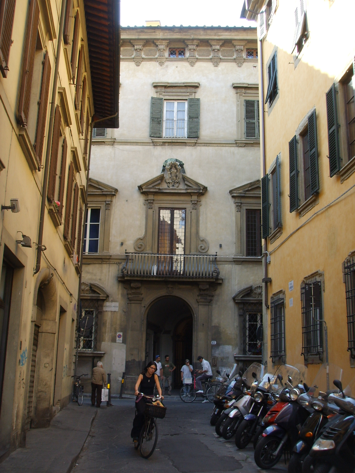 Palazzo_Roffia in Florence